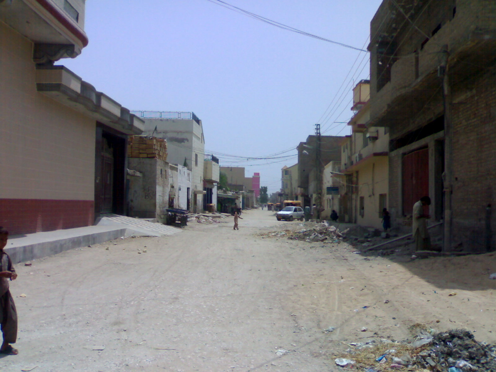 Dawach Street